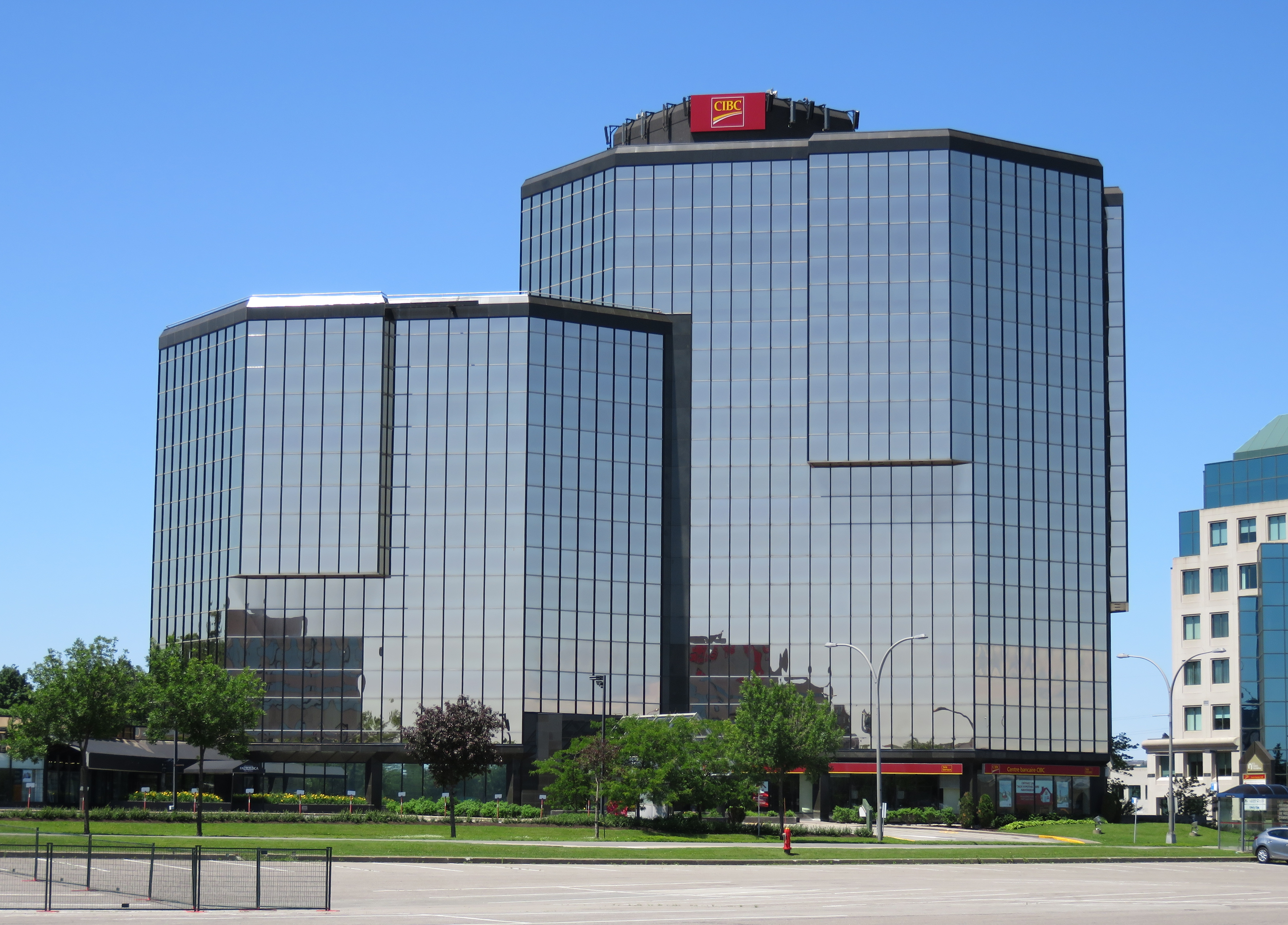 Tour Triomphe II, 2540 boulevard Daniel-Johnson, Laval, Québec, Canada.